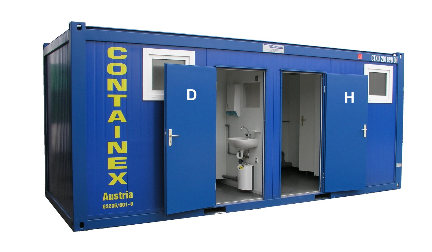 Sanitärcontainer in der Ausführung als Toilettencontainer. Eingesetzt werden diese bei Veranstaltungen, Umbauten und in Kombination mit Bürocontainern als Containeranlage.; Fotograf: Markus Schaden; Lieferant * Containex